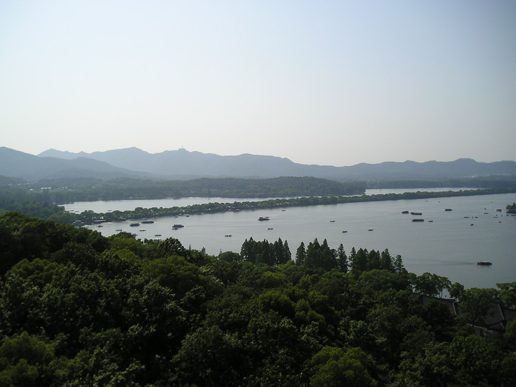 苏堤